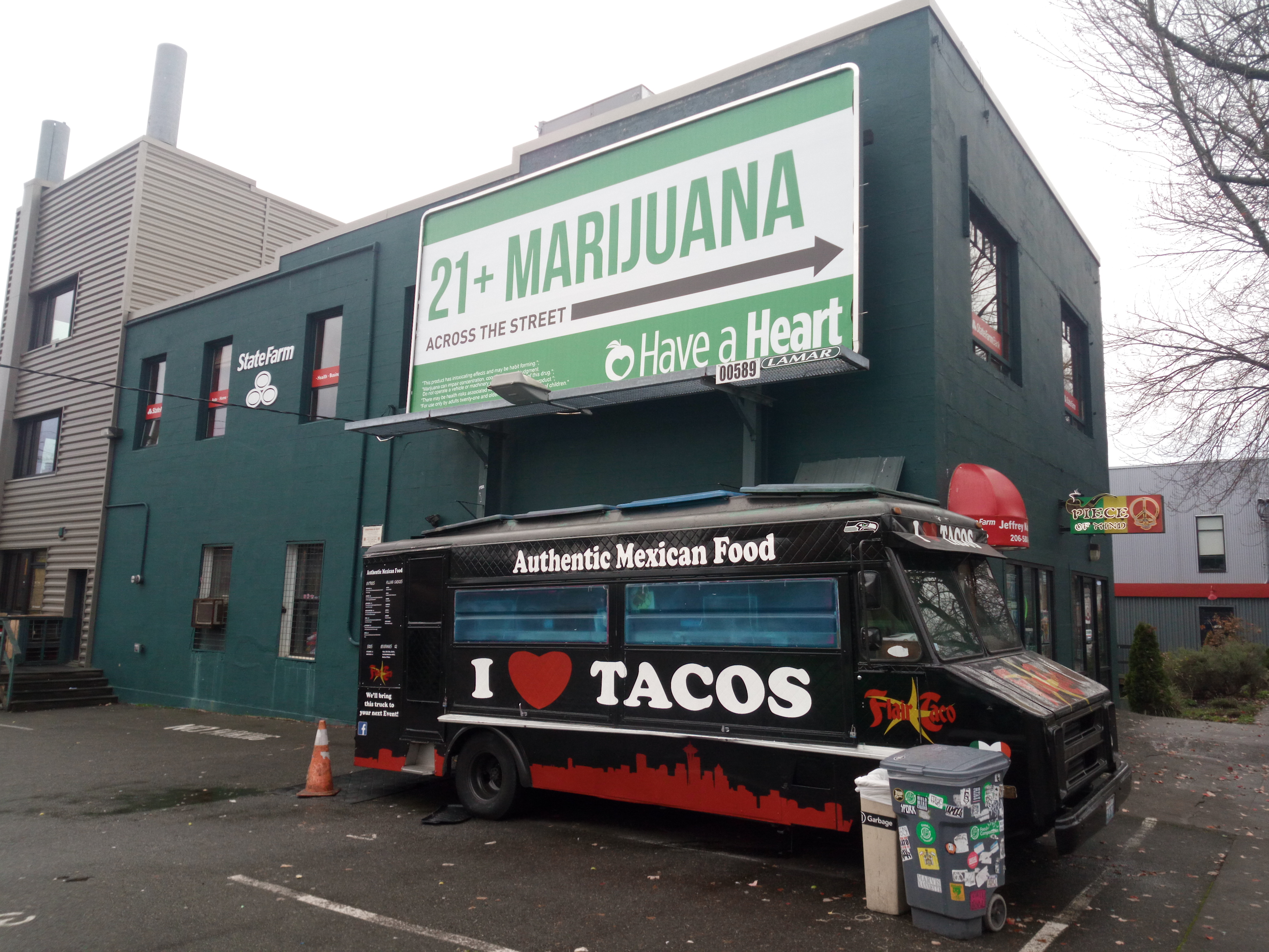 Visite de Seattle début novembre 2016.